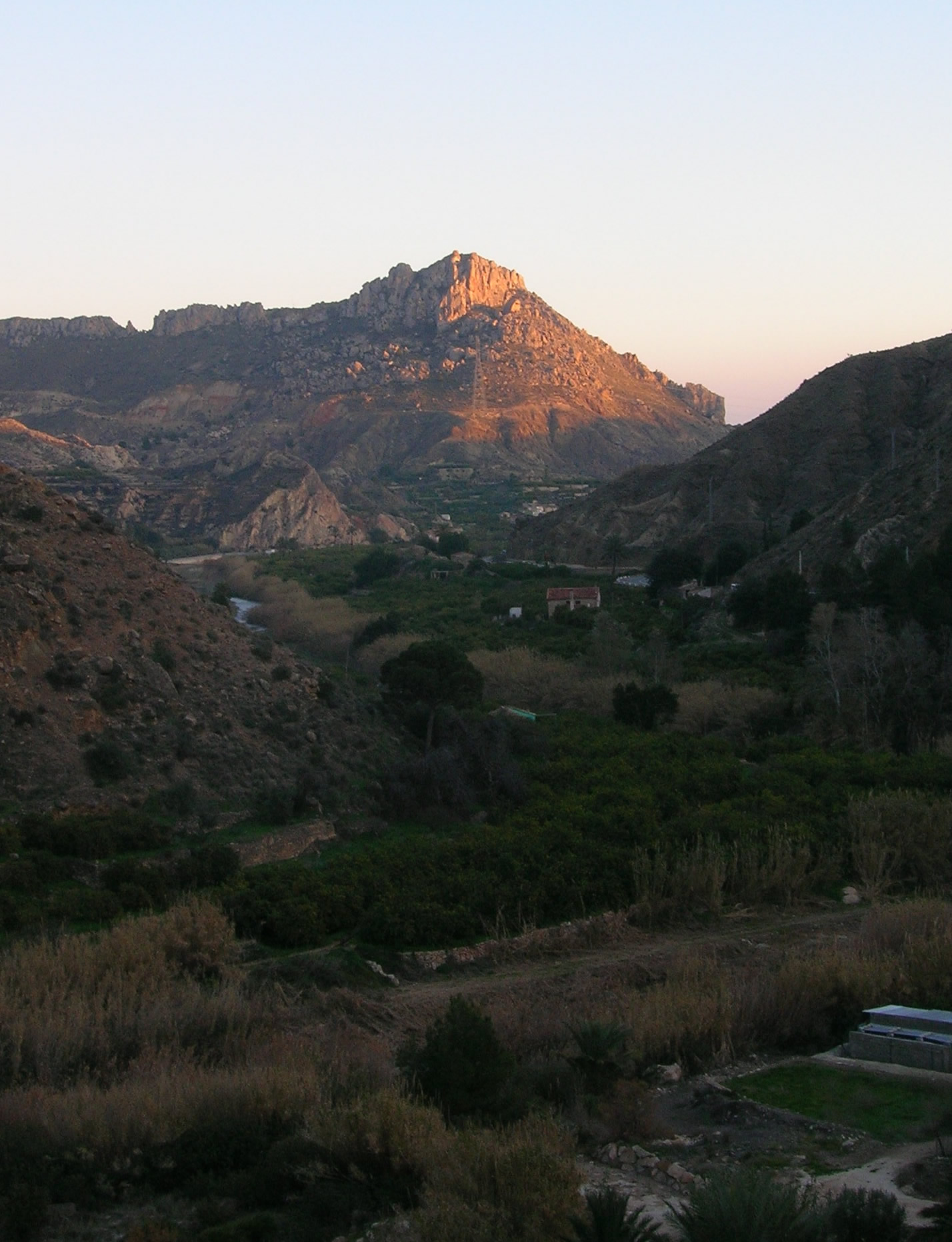 Río Segura en las proximidades de Ojós, Murcia, España (poco después del Azud de Ojós, antes del pueblo y pasado Blanca). River Segura in the vicinity of Ojos, Murcia, Spain. Own picture, given to PD.